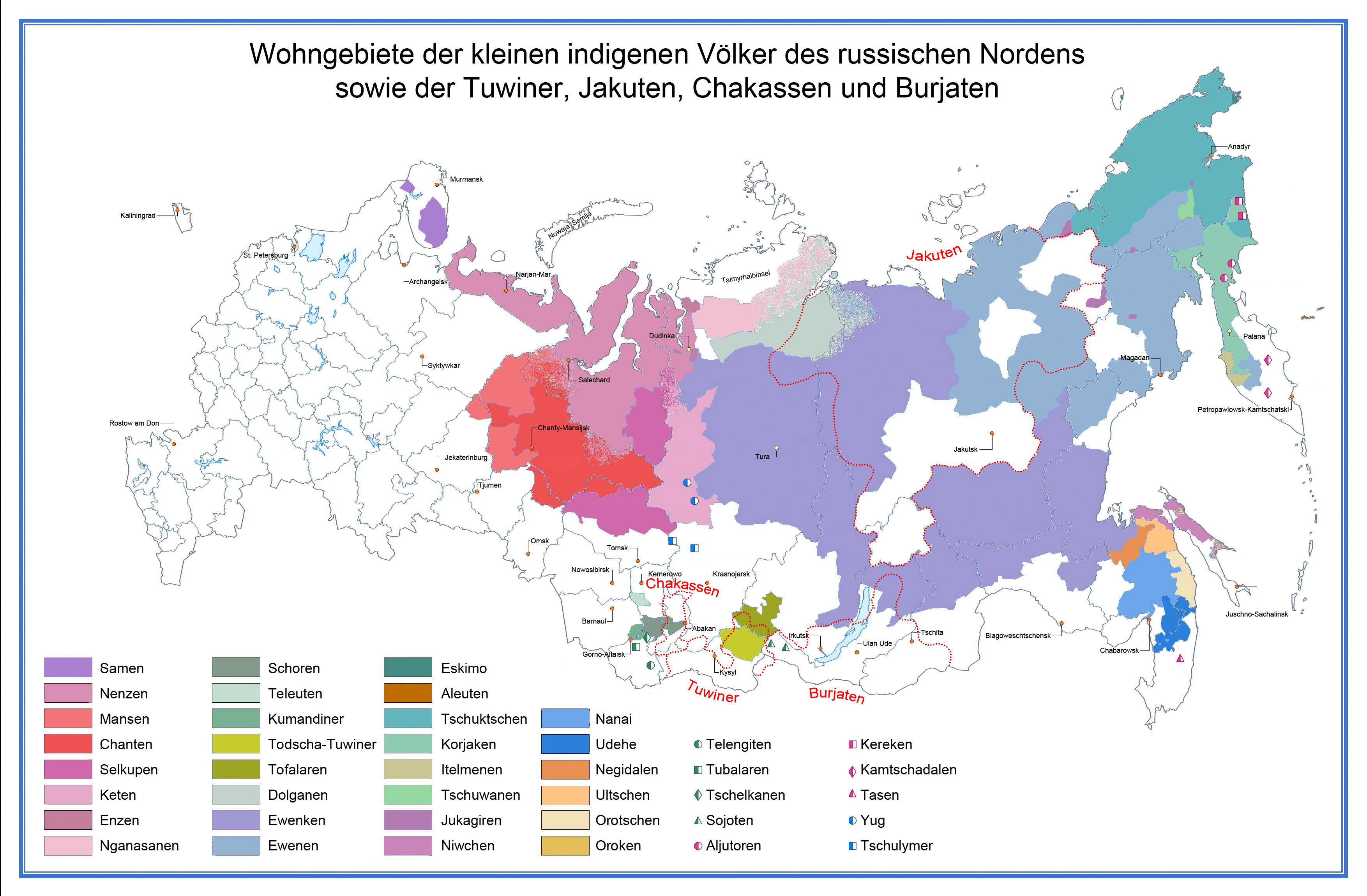 Die Wohngebiete der heutigen indigenen Völker des russischen Nordens